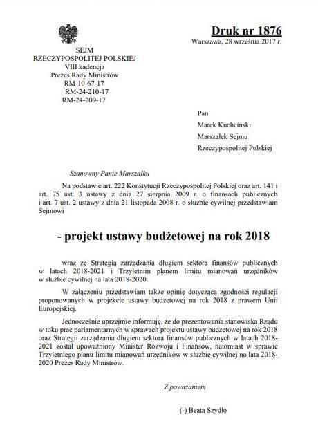 Projekt ustawy budżetowej na 2018 druk 1876 (strona tytułowa)